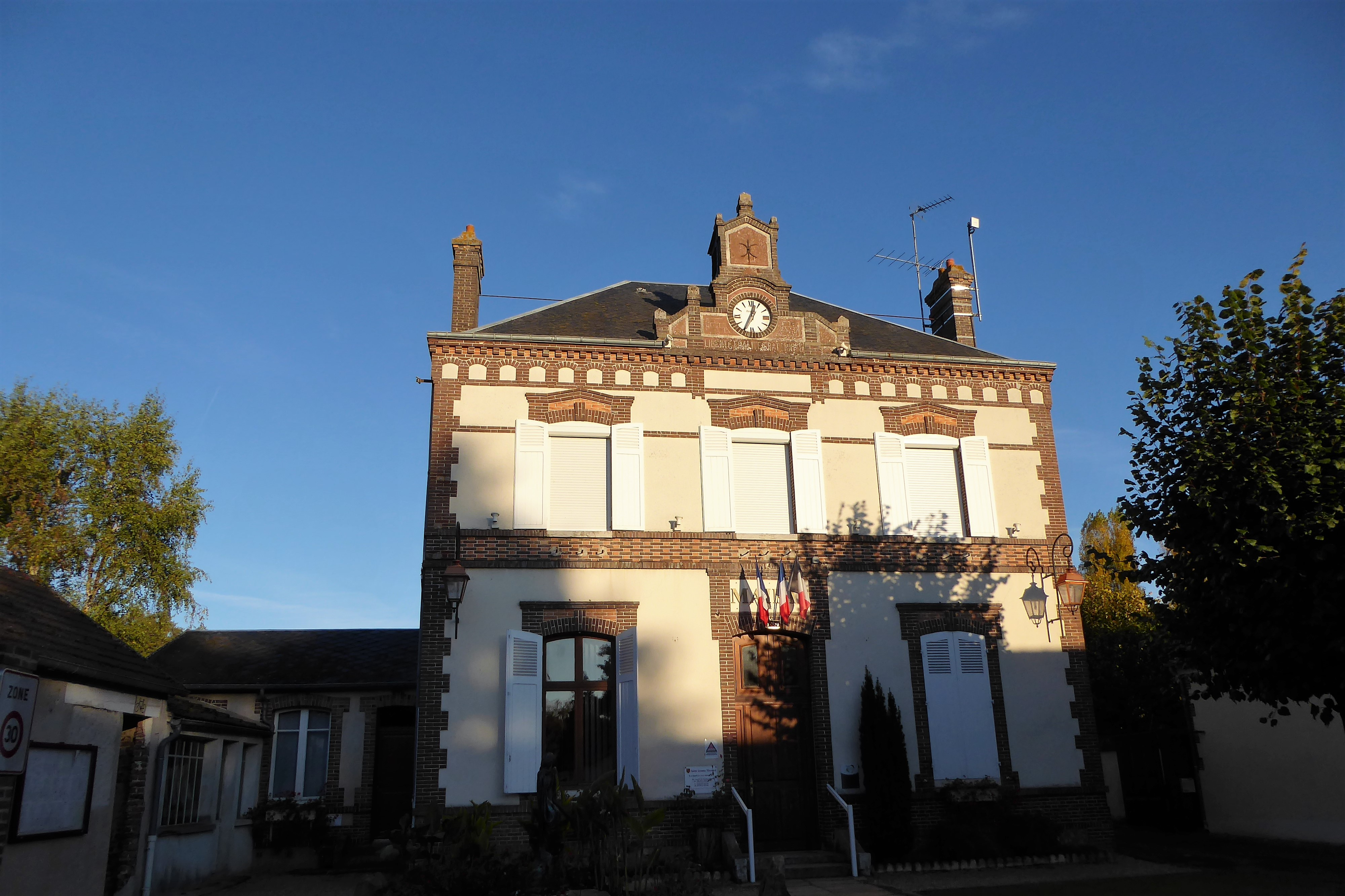 mairie de Sainte-Gemme-Moronval, Eure-et-Loir, France.